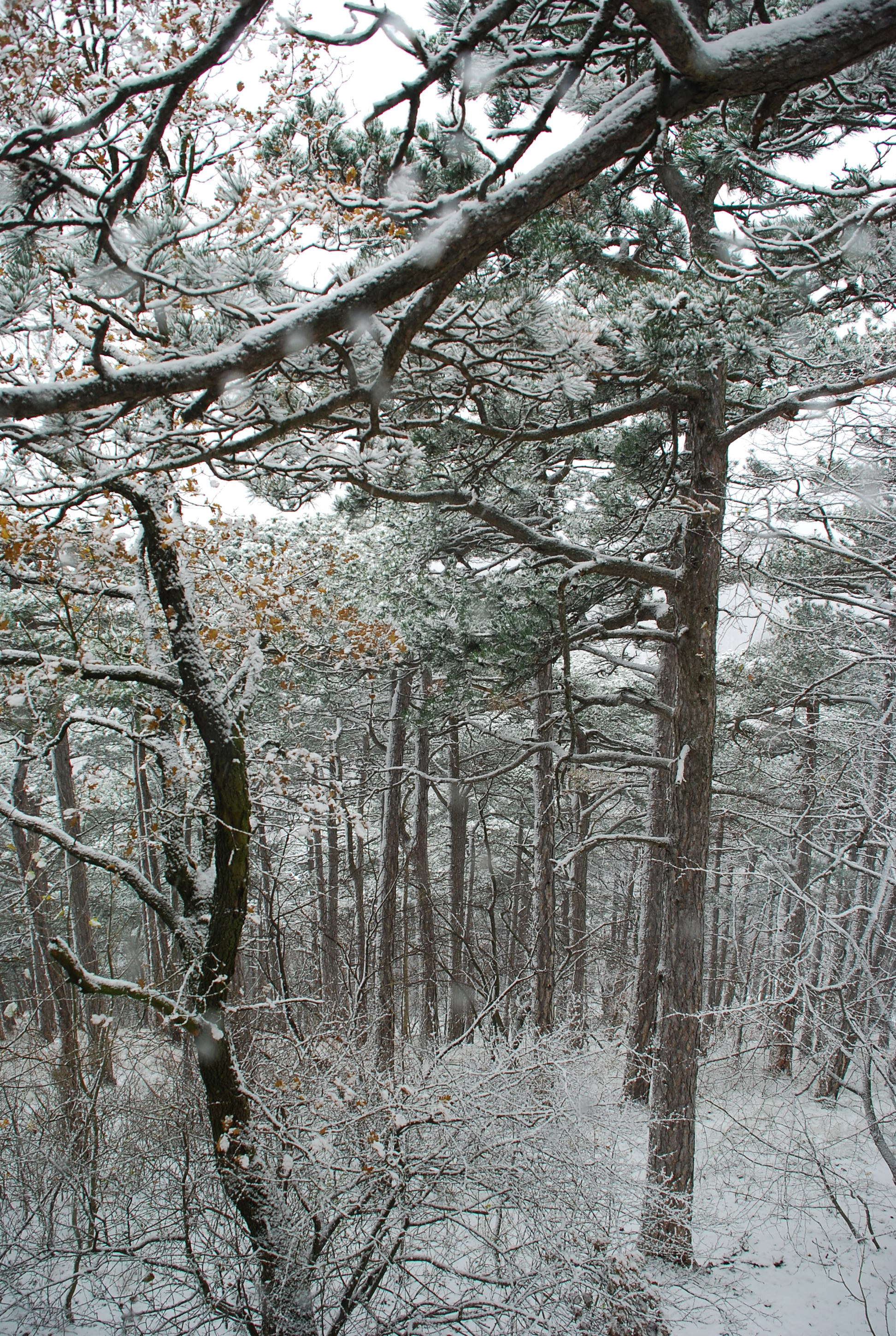 Winterwald am Teufelstein, Österreich